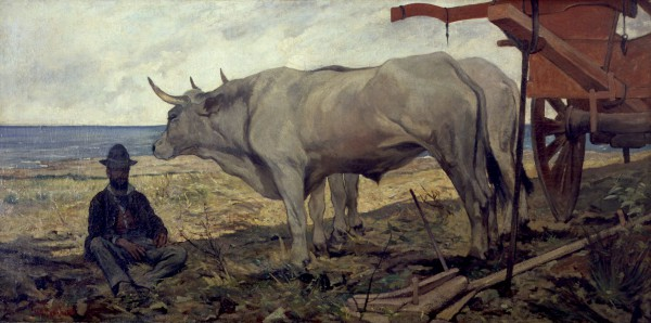 Il riposolabel QS:Lit,"Il riposo"